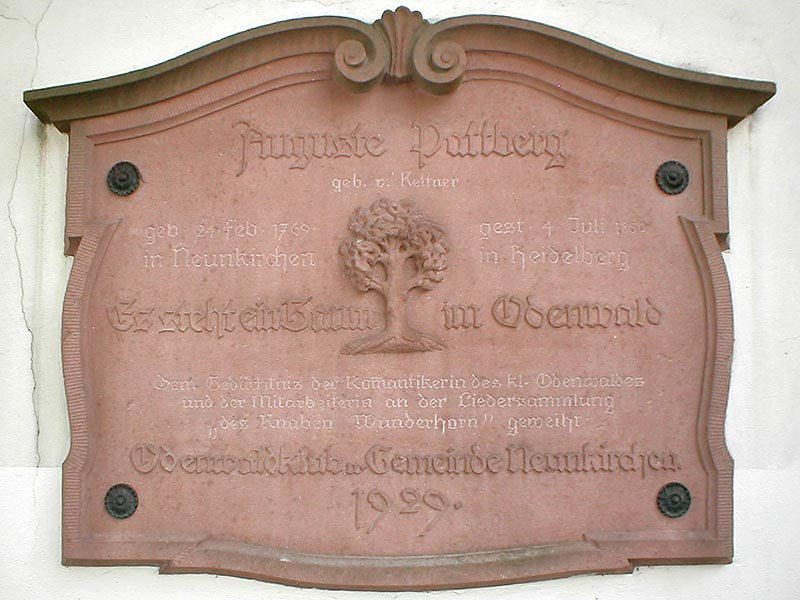 Gedenkstein für Auguste Pattberg an der kath. Kirche in Neunkirchen (Odenwald)